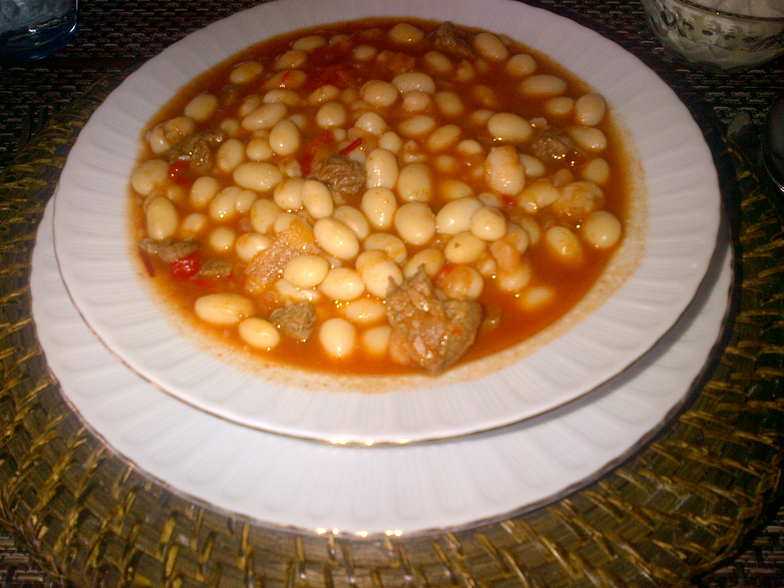 Etli kuru fasulye, guiso de alubias (del Mar Negro) con carne de ternera, de la cocina turca.